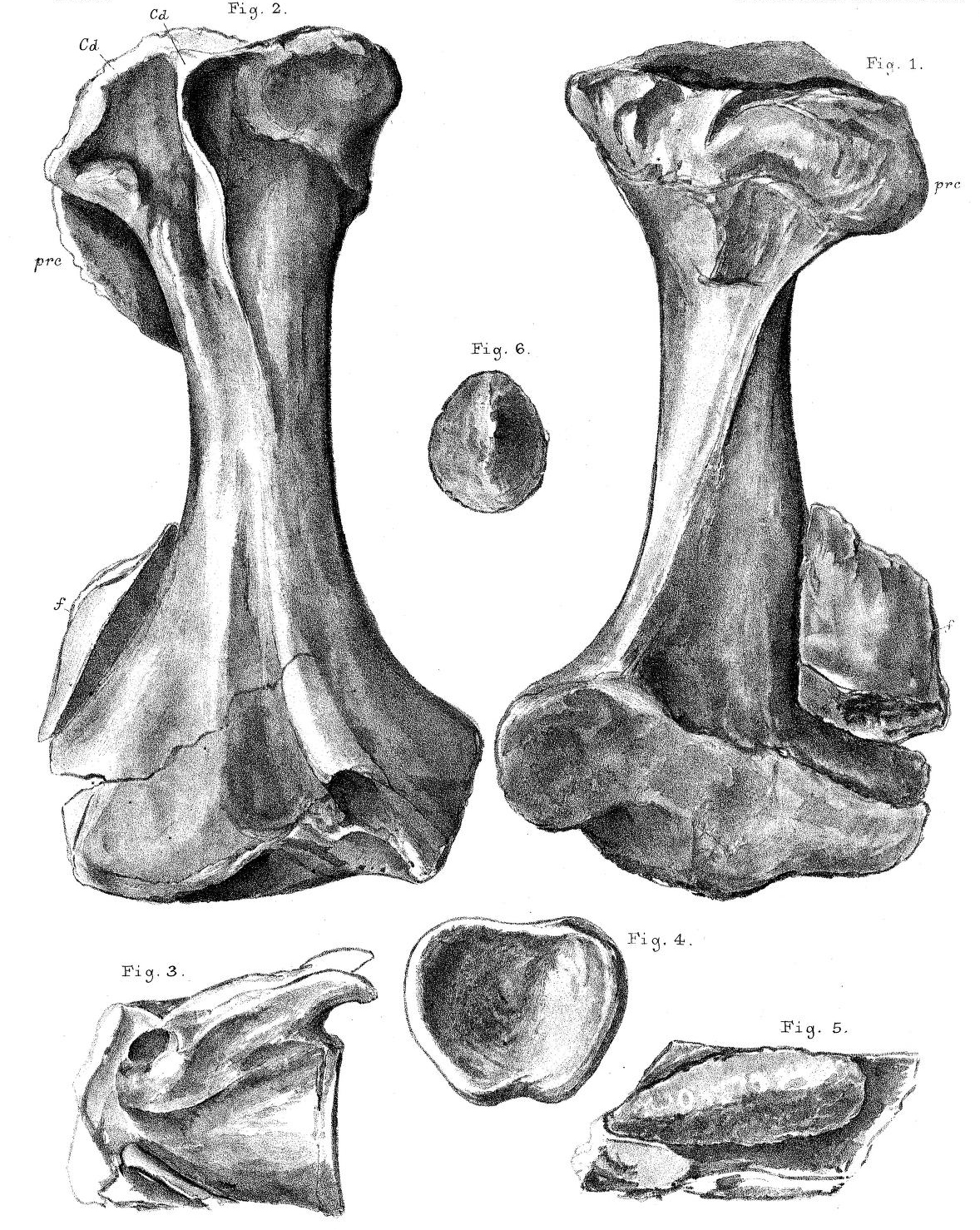 1-2: Tibia 3-4: Caudal vertebra 5: scute 6: scute of Polacanthus.